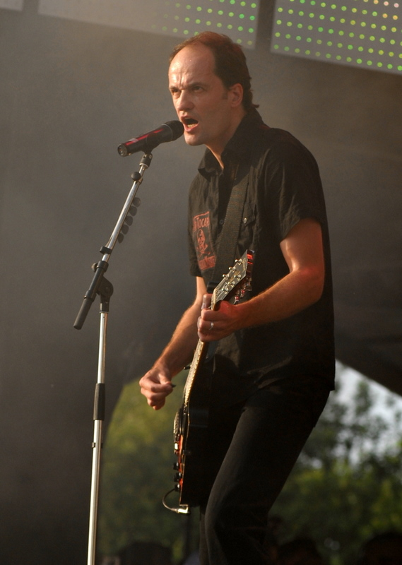 Breiti von den Toten Hosen bei "Deine Stimme Gegen Armut" (Your Voice Against Poverty) concert in Rostock, Germany on June 7th, 2007.